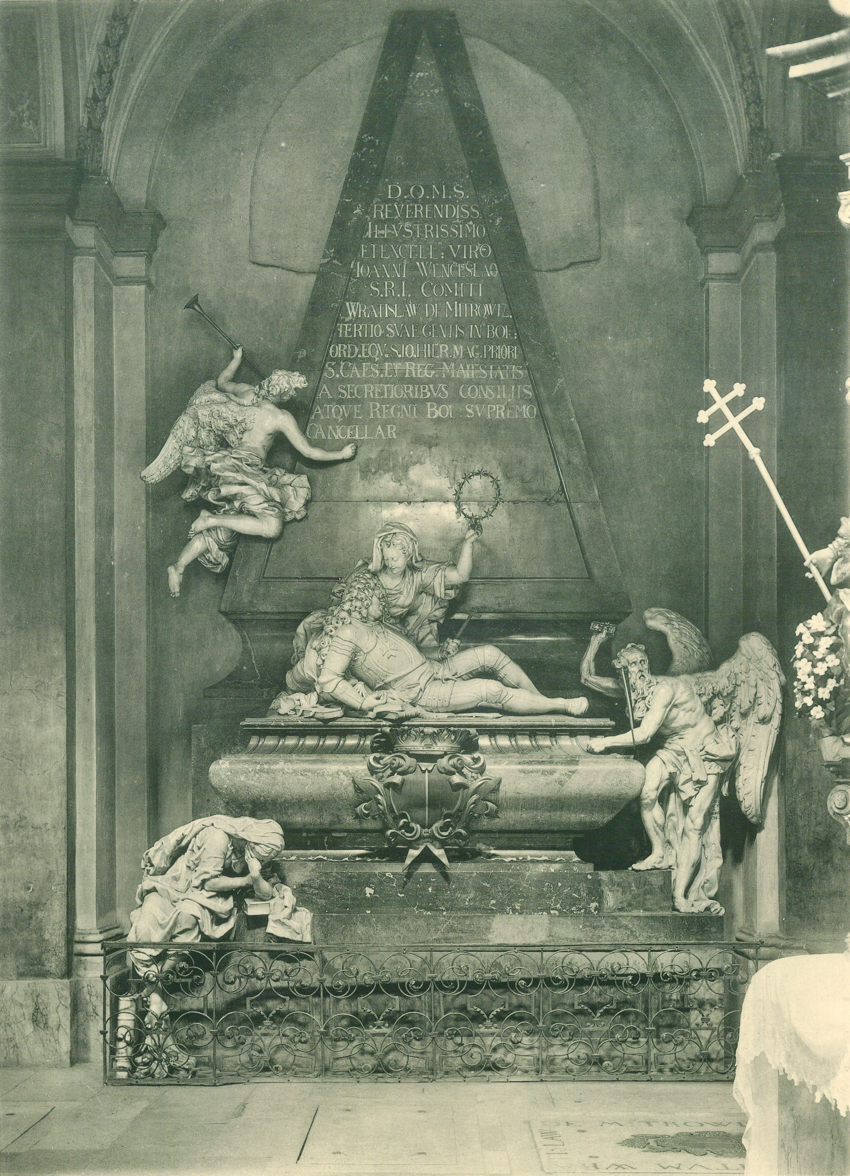 Ferdinand Maxmilián Brokoff: Náhrobek Václava Vratislava z Mitrovic, Praha, kostel svatého Jakuba Většího